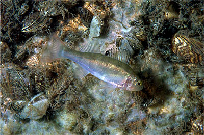 Kleine Baars Perca fluviatilis 6 mrt 2004 08:01 (CET)